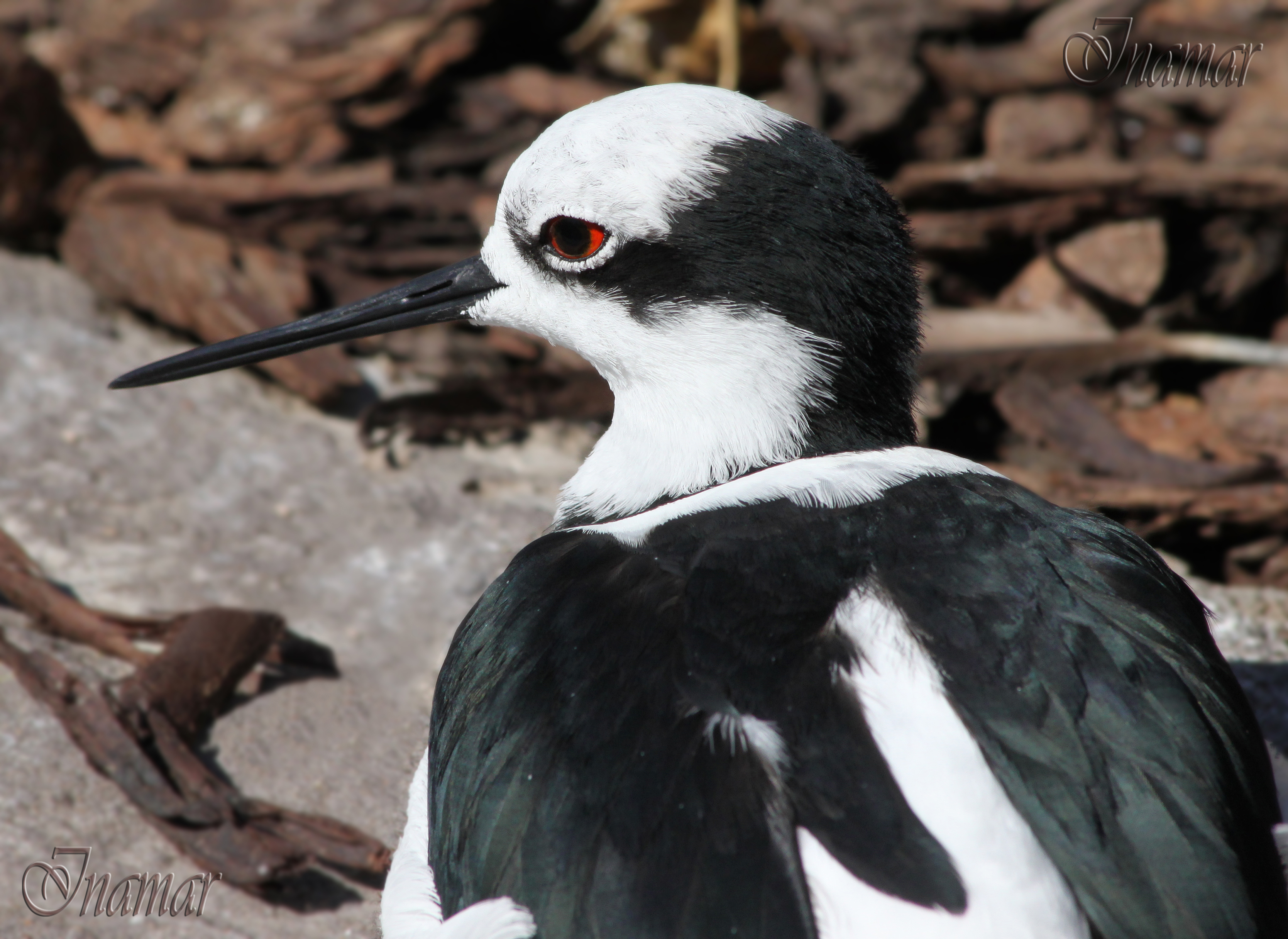 foto de un tero real recostado en el suelo